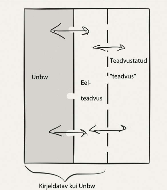 Informatsiooni liikumine teadvuse erinevate tasemete vahel